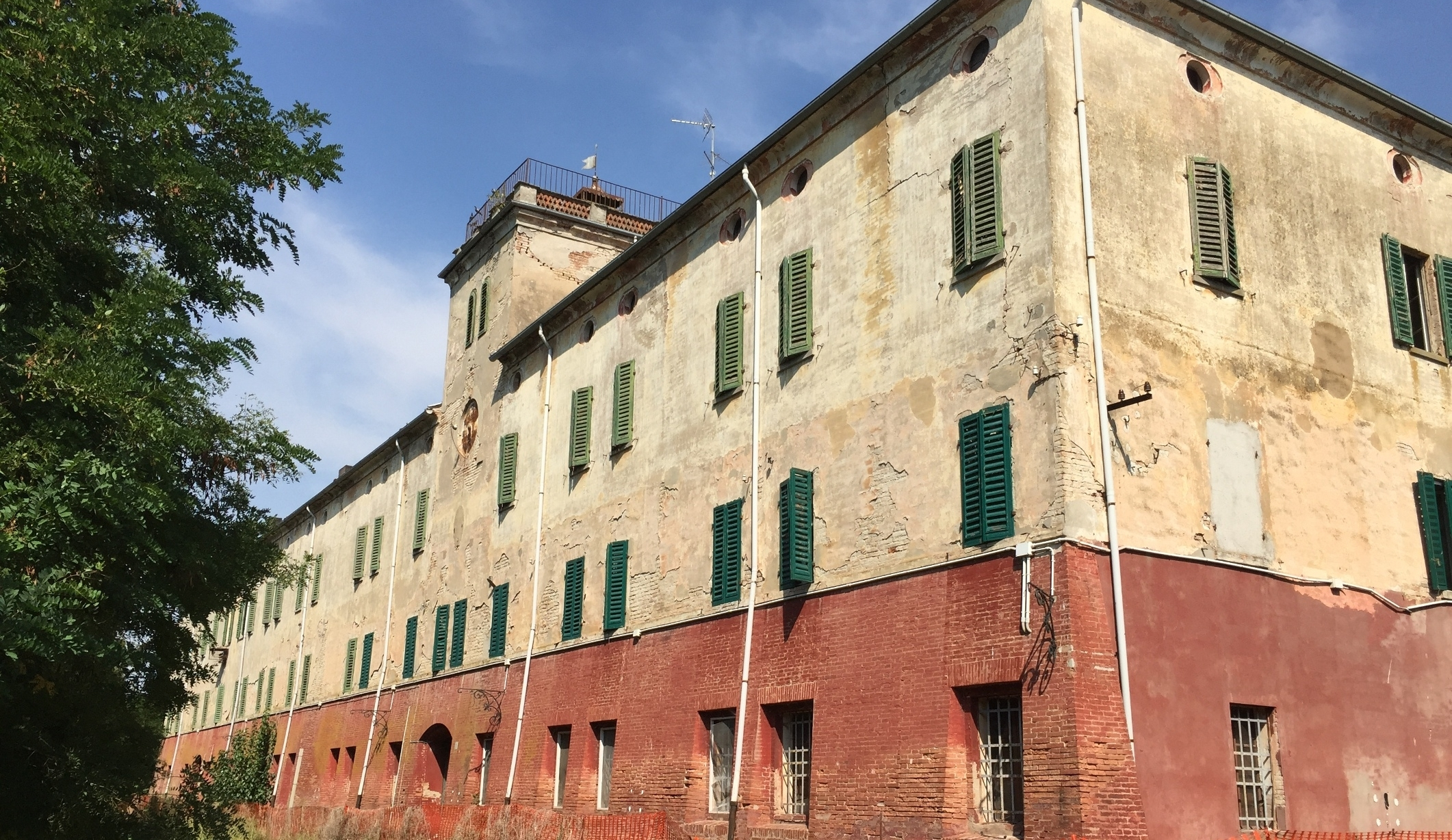 Palazzo di Portovecchio, ex sede del 5° Centro Allevamento Cavalli di San Mrtino Spino (Mirandola, Modena)